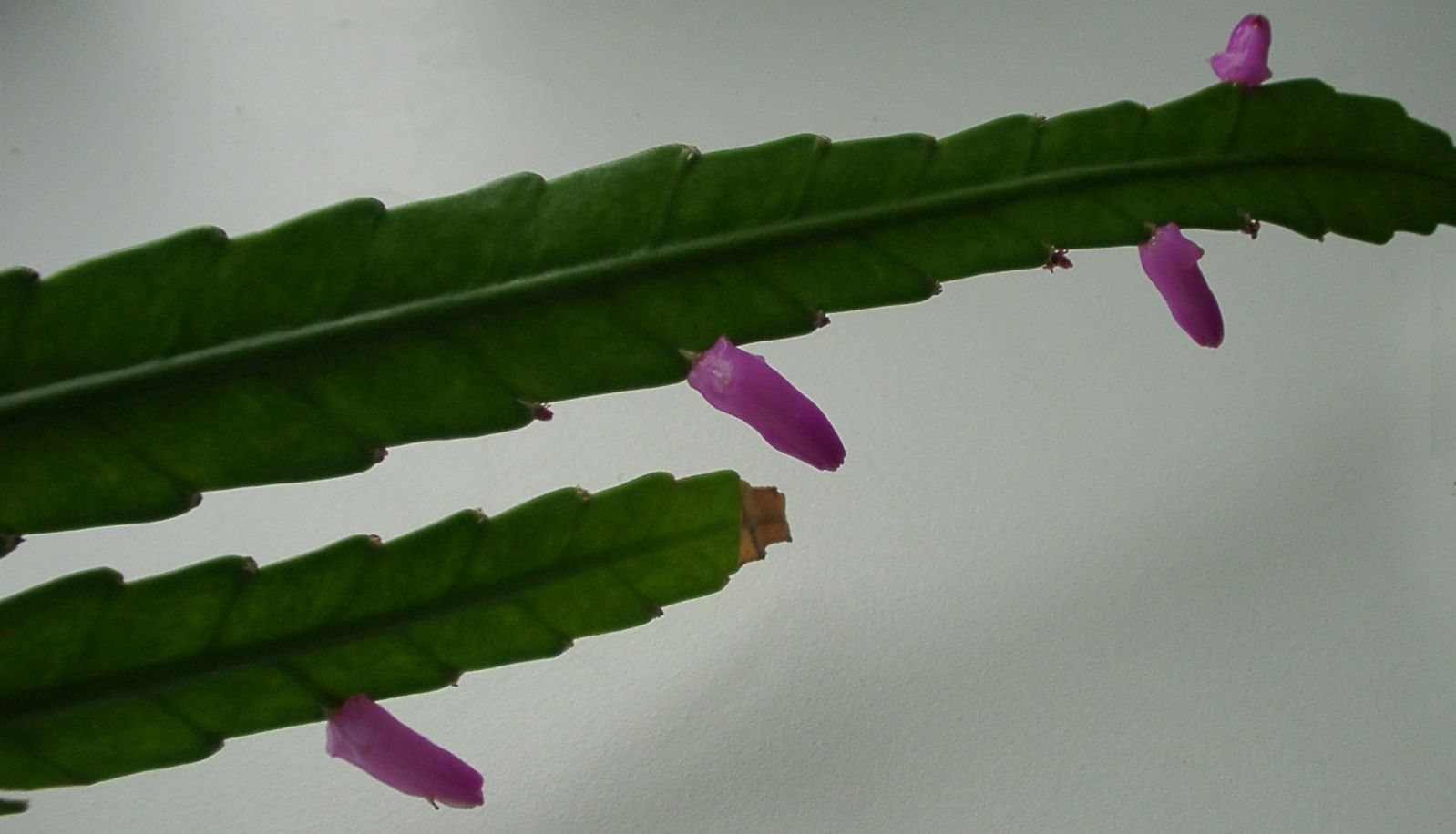 Pseudorhipsalis (Wittiocactus) amazonica (Hylocereeae; Cactaceae; Planta) kaktusz virágzó hajtása